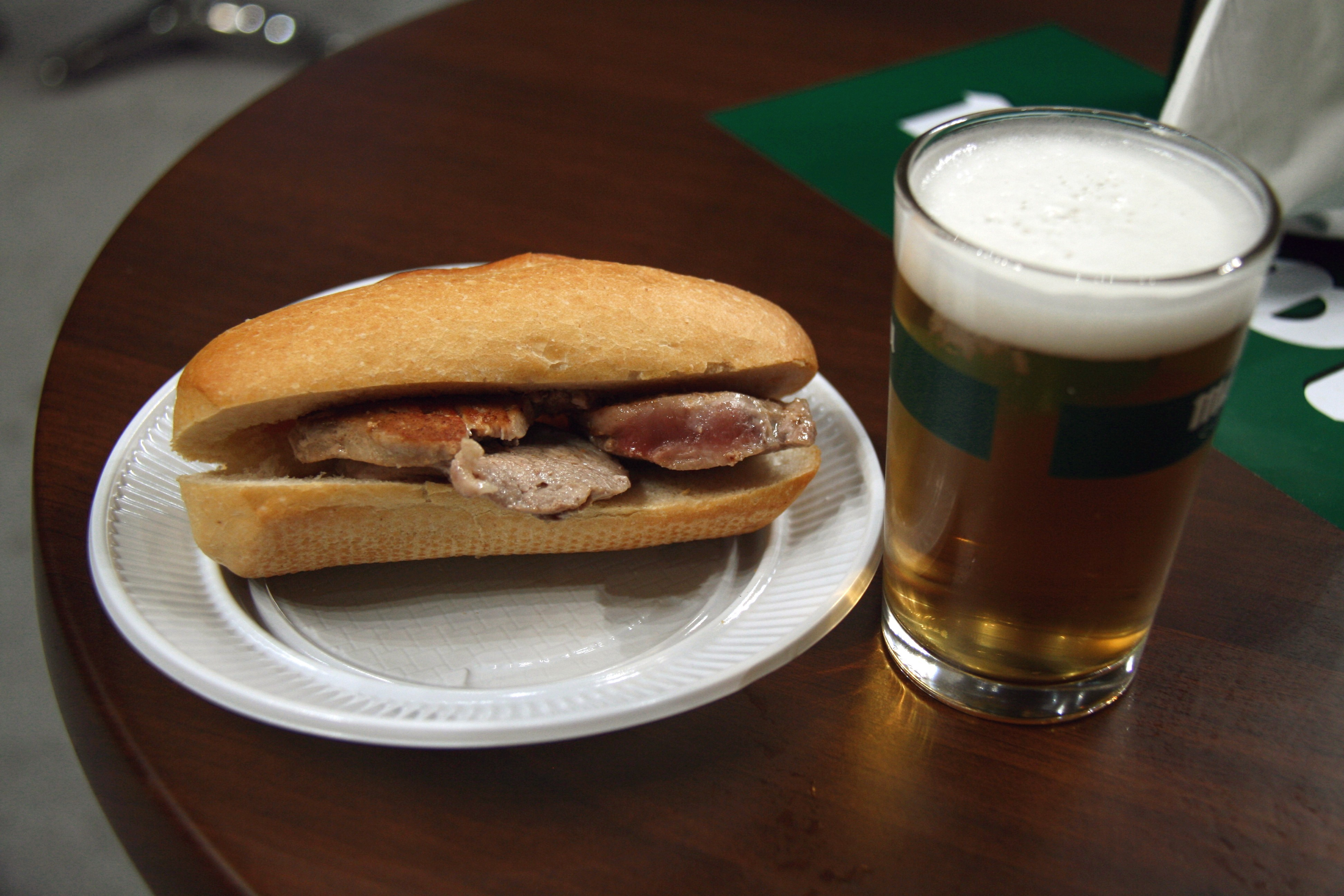 Pepito de lomo (en tapa) servido con